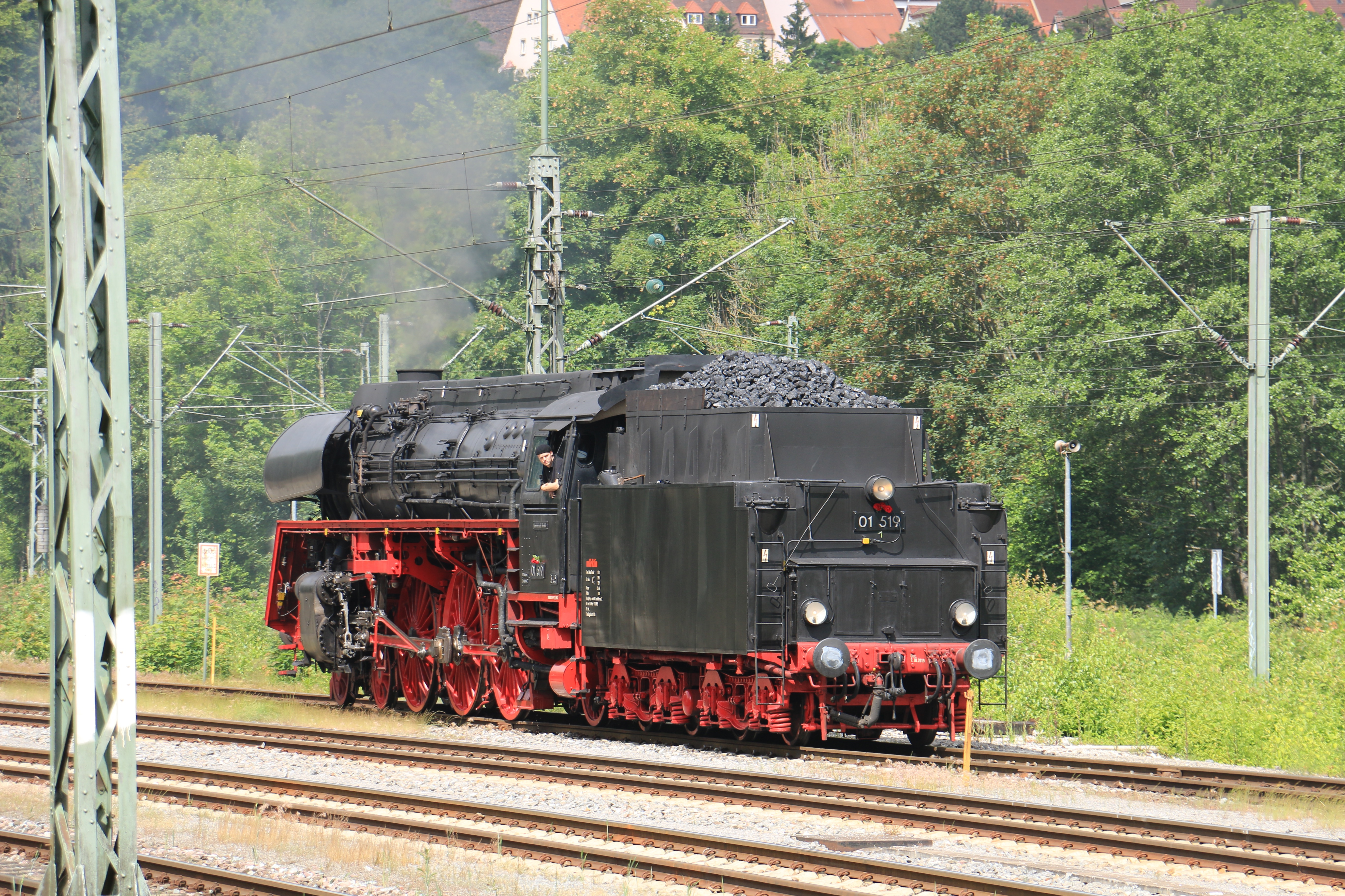 Dampflokomotive 01519 der EFZ